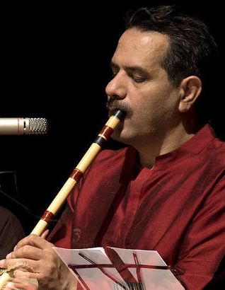 داوود ورزیده - کنسرت حسام الدین سراج - تالار حافظ شیراز- ۲۷ خرداد ۱۳۹۴